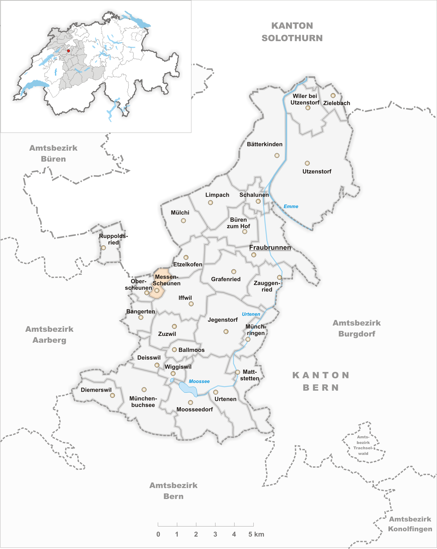 Municipality Messen-Scheunen